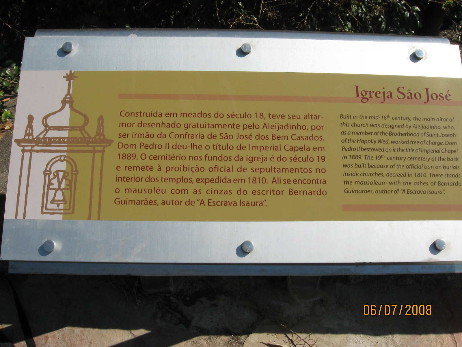 Igreja de São Jose Ouro Preto Minas Gerais (Texto Explicativo)